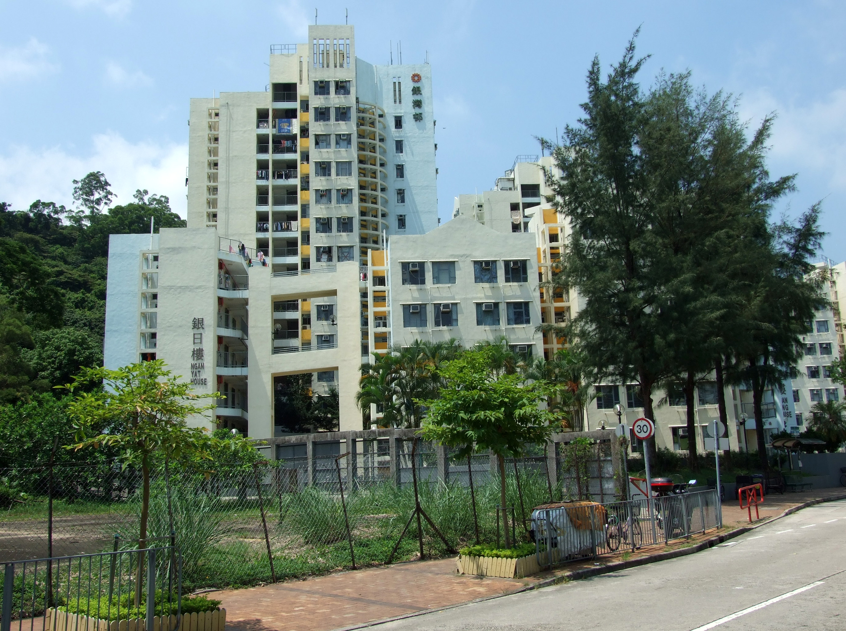 中文（香港）: 銀灣邨